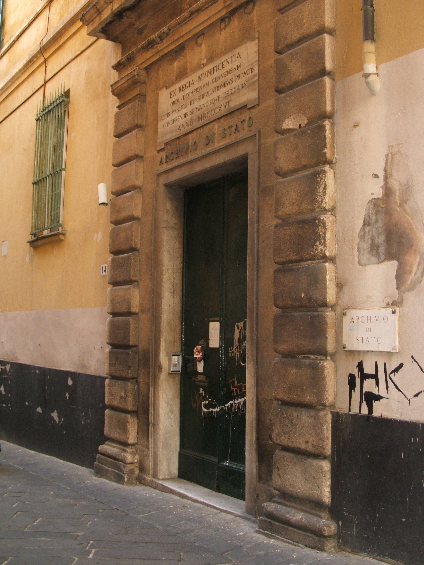 Genova, ingresso all'Archivio di Stato